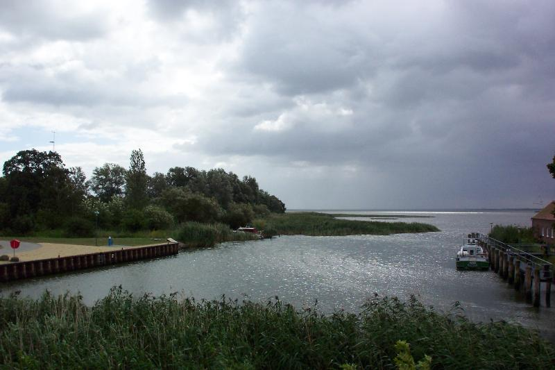 Peenestrom bei Zecherin, Usedom